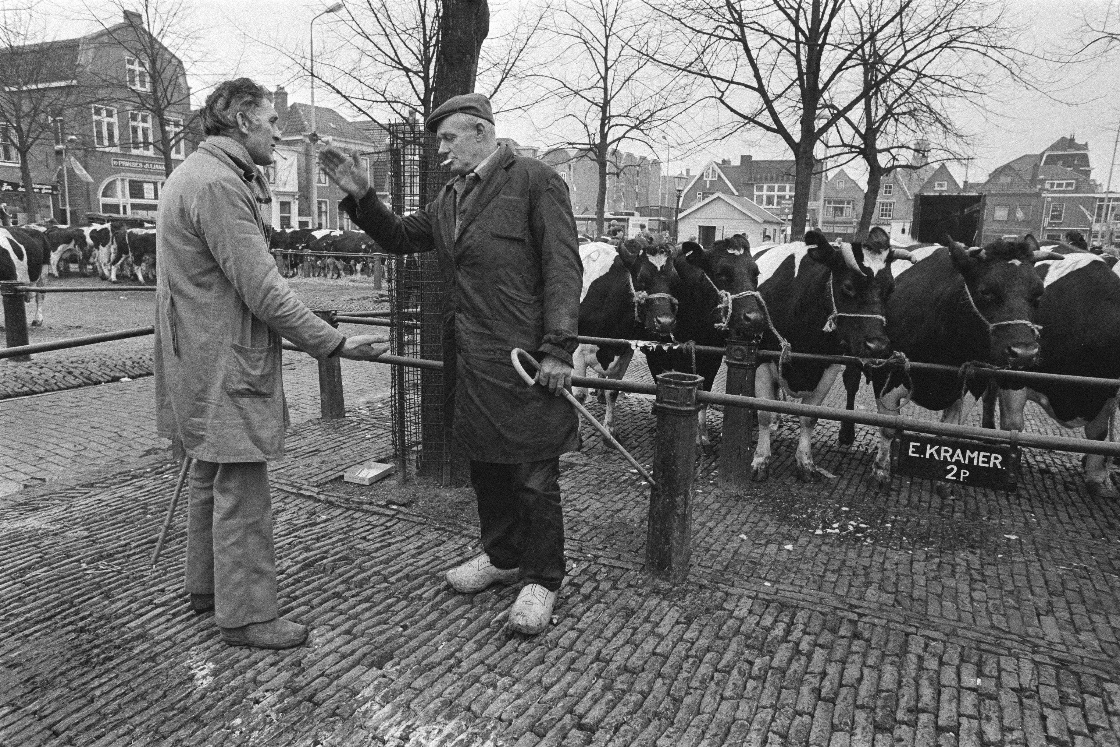 Collectie / Archief : Fotocollectie Anefo Reportage / Serie : [ onbekend ] Beschrijving : Veemarkt Purmerend (eerste keer weer na mond- en klauwzeer in Noord Holland ); "handjeklap" Datum : 13 maart 1984 Locatie : Purmerend Trefwoorden : markten, vee Fotograaf : Bogaerts, Rob / Anefo Auteursrechthebbende : Nationaal Archief Materiaalsoort : Negatief (zwart/wit) Nummer archiefinventaris : bekijk toegang 2.24.01.05 Bestanddeelnummer : 932-8938